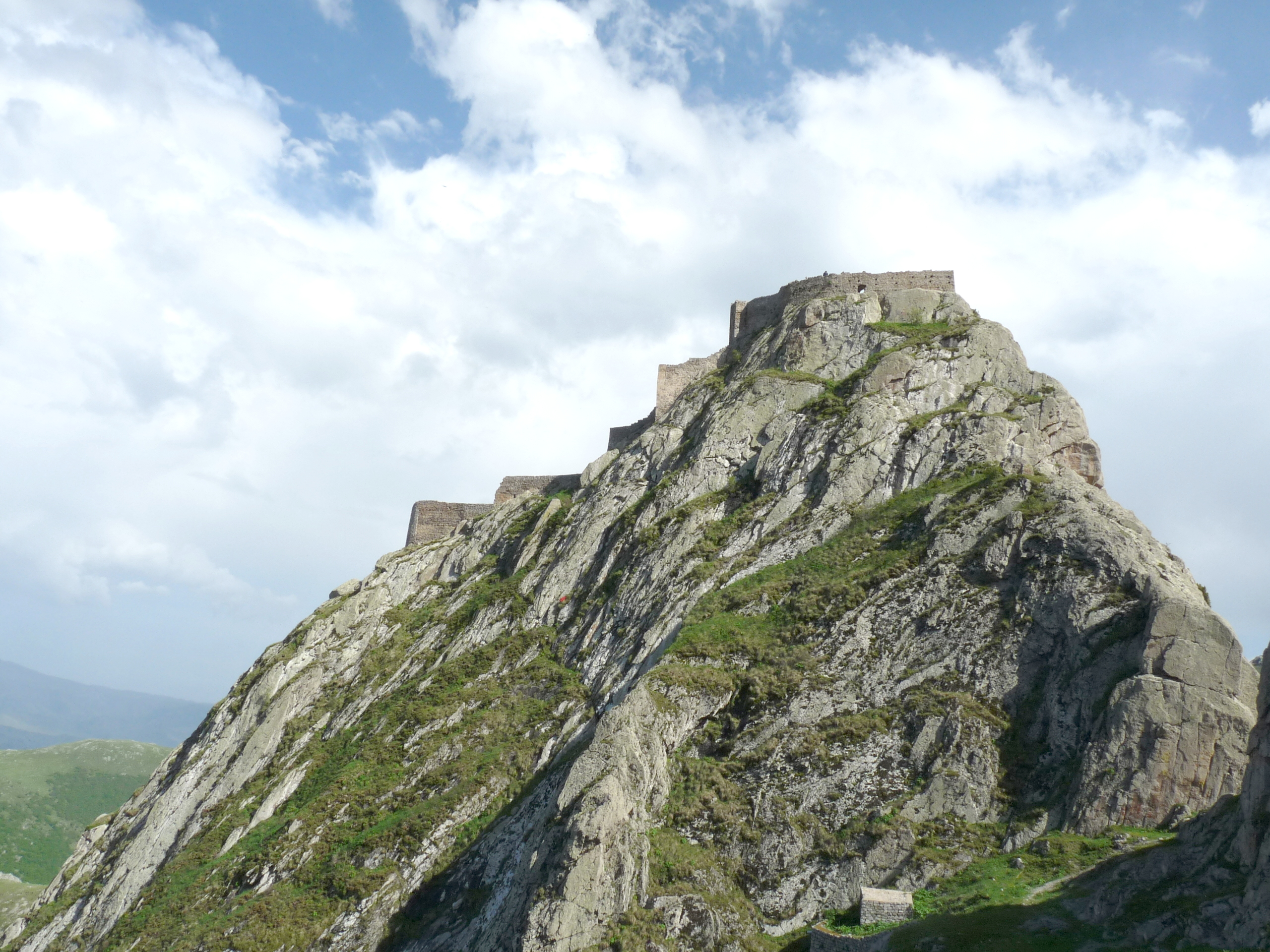 Babak castle